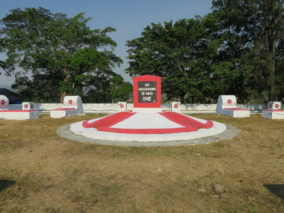 Gedenkstätte an die Opfer der japanischen Besatzung in Aileu